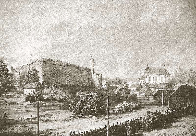 Podpis oryginalny: "LIDA nad rzeką Lidzieją (G. Wileńska) Miasteczko bardzo dawne. Ruiny zamku zbudowanego przez W.X.L. Gedymina w r. 1323. Zjeżdżali do zamku tego W.X. Witold, Jagełło, Alexander Jagiellończyk. Tu mieszkał Tochtamysz han tatarski, Starostą lidzkim był Hadżi Giraj późniejszy han Krymski. Zamek zburzony przez Szwedów około roku 1710."